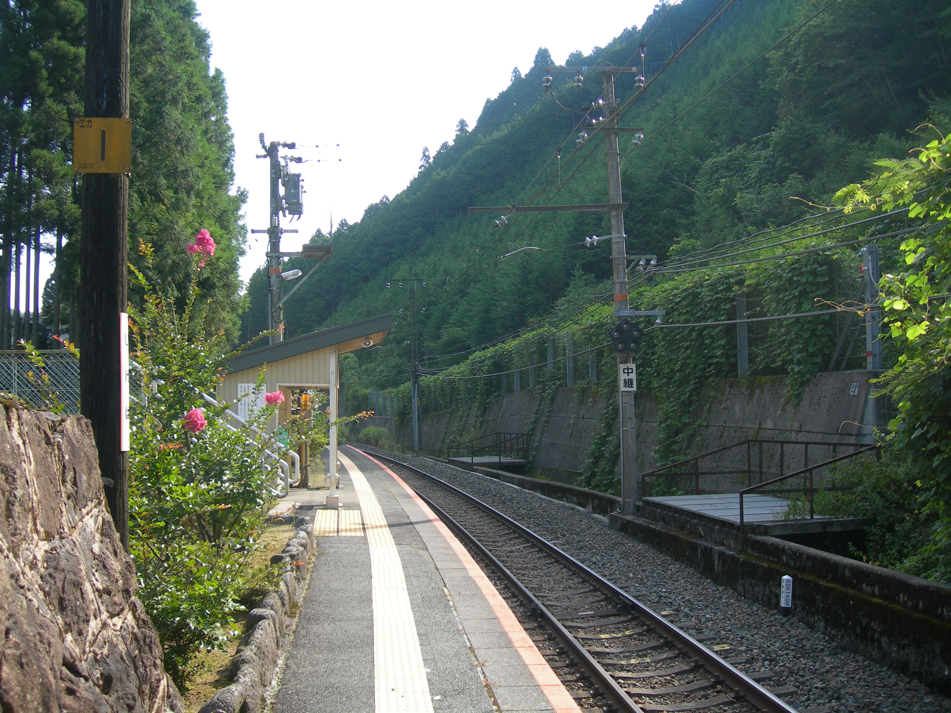 池場駅プラットホーム